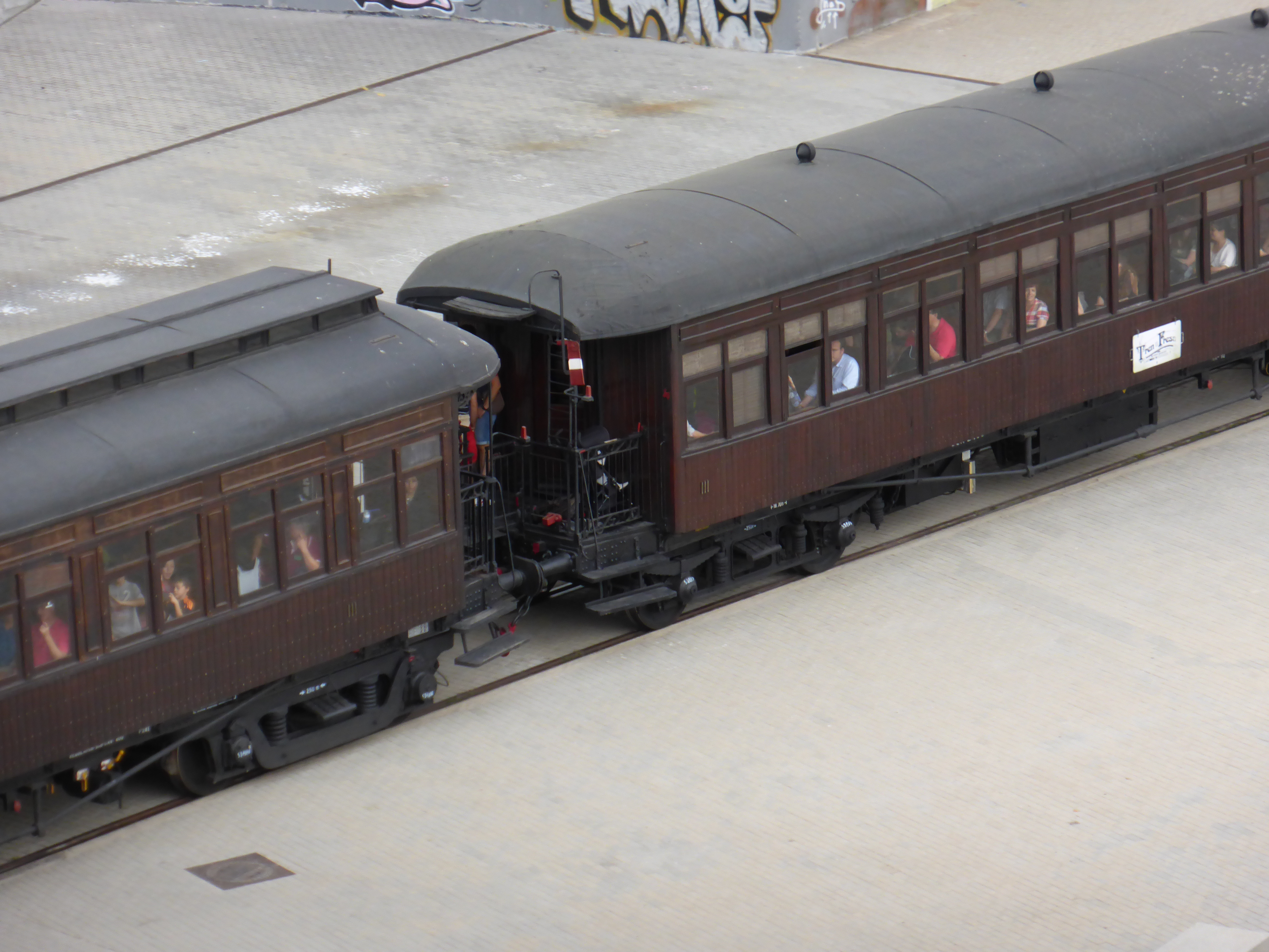 El Tren de la Fresa es un tren turístico que recorre el trayecto Madrid-Aranjuez, en algunos meses del año. Los "coches de viajeros" (vagones) son de madera, construidos en los años 20, del siglo XX. La locomotora es una diésel, pero hasta hace pocos años era de vapor. La fotografía está tomada muy cerca del Museo del Ferrocarril, en las vías exteriores hacia la Estación de Delicias, concluyendo el viaje. Estas vías están en el parque junto a la estación.